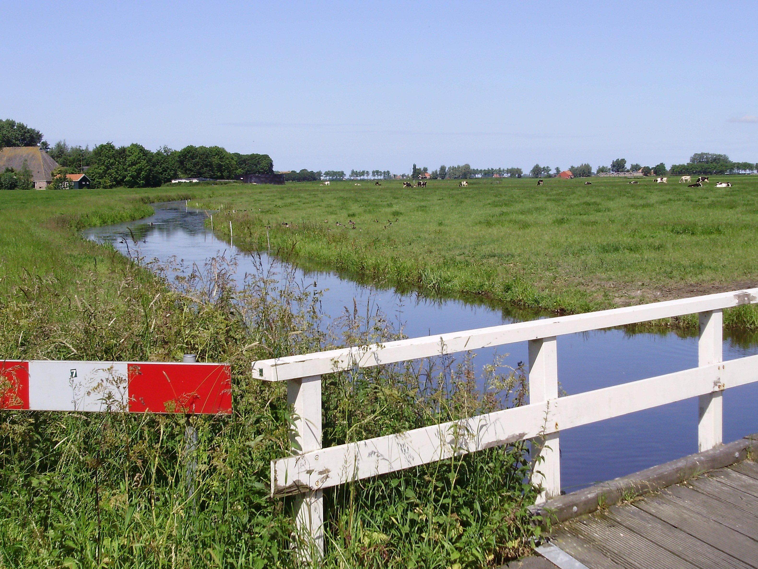 De Moezel tussen Rauwerd en Friens, provincie Friesland (Nederland)